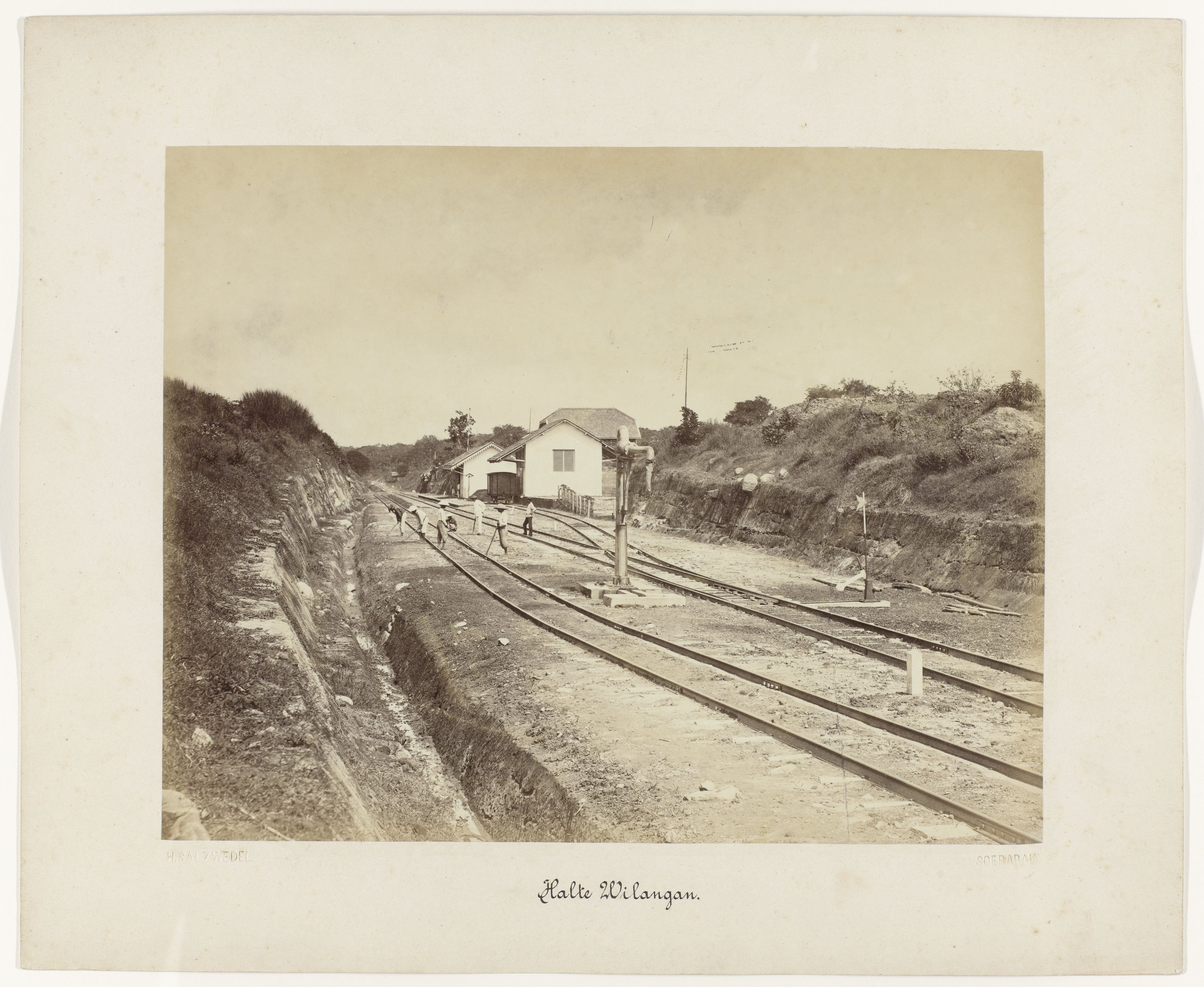 IdentificatieTitel(s): Halte Wilangan (titel op object)Staatsspoorwegen op Java (serietitel)Objecttype: foto Objectnummer: NG-1988-26-24Omschrijving: De halte of station van Wilangan. Een groepje arbeiders werkt aan het spoor. Geplakt op karton.Onderdeel van een groep van 62 foto's in een doos met het opschrift "Staatsspoorwegen op Java" uit 1888.VervaardigingVervaardiger: fotograaf: Herman Salzwedel (vermeld op object)Plaats vervaardiging: SurabayaDatering: 1880 - 1888Fysieke kenmerken: albuminedrukMateriaal: fotopapier Techniek: albuminedrukAfmetingen: foto: h 215 mm × b 275 mmkarton: h 300 mm × b 370 mmOnderwerpWanneer: 1880 - 1888Waar: JavaVerwerving en rechtenVerwerving: aankoop 30-aug-1988Copyright: Publiek domein